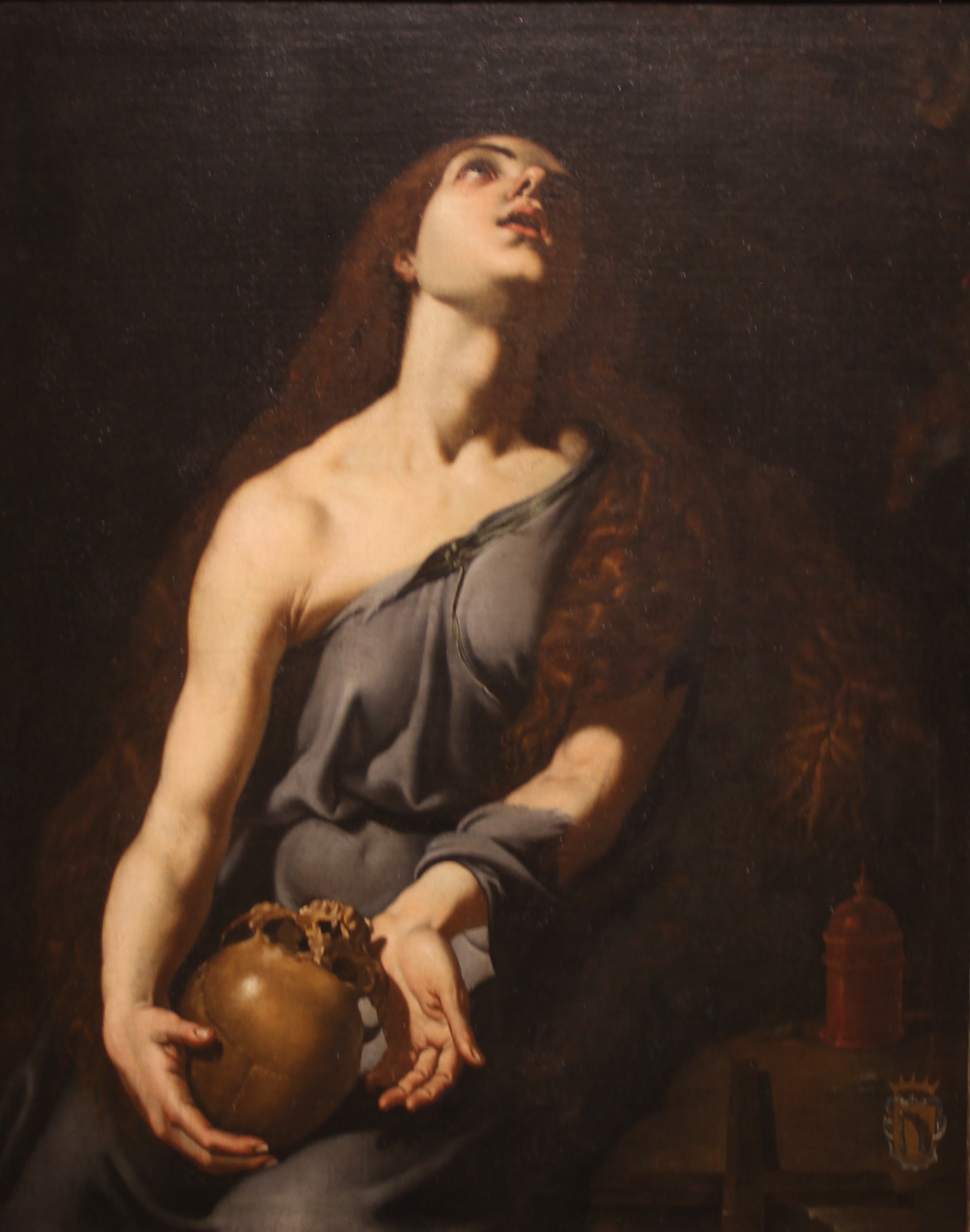 Marie-Madeleine en pénitente. Son vase de parfum est posé sur la table. Musée des beaux-arts de Valence (Espagne)